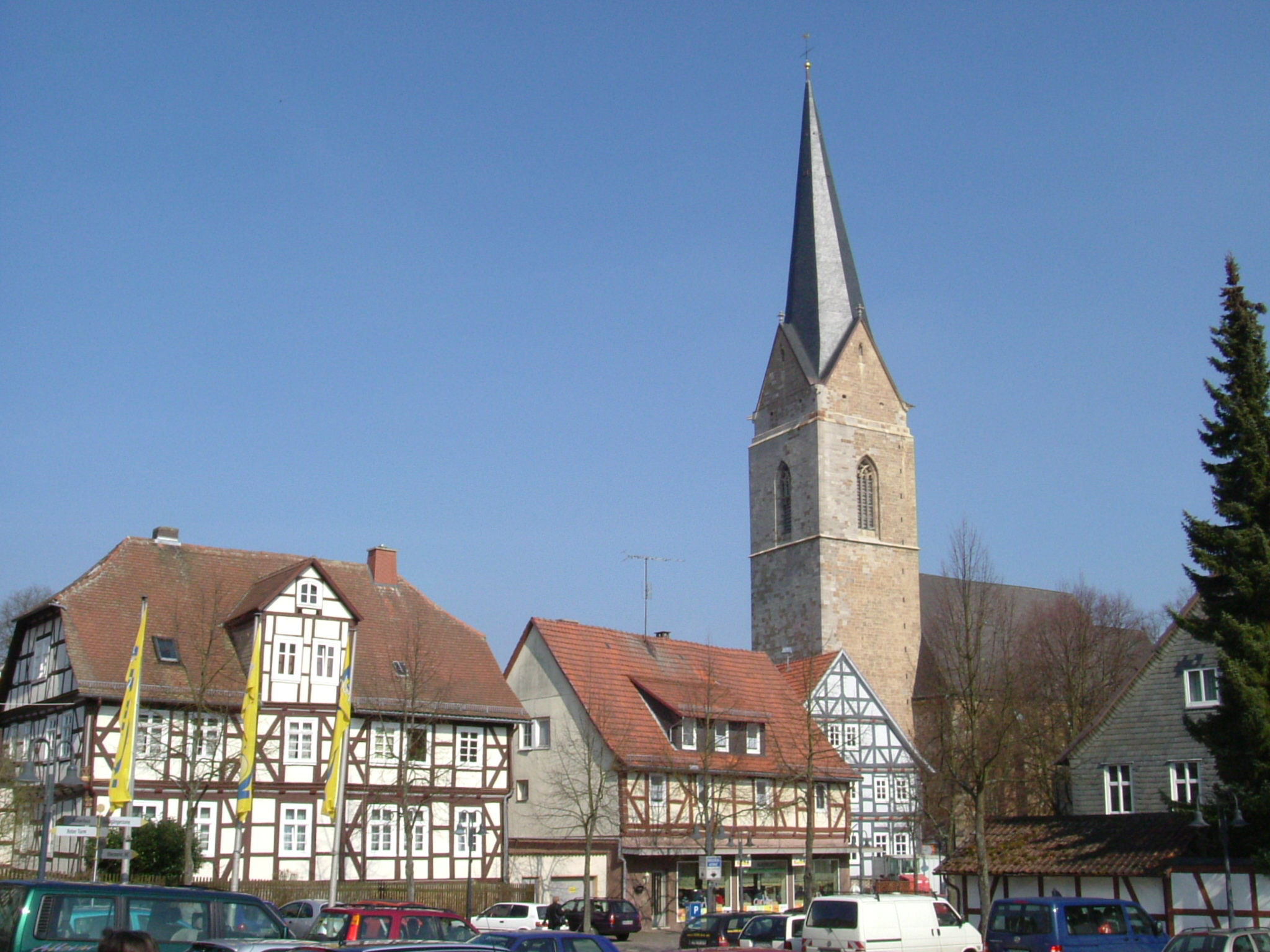 Korbach, Germany. St. Nikolai church.